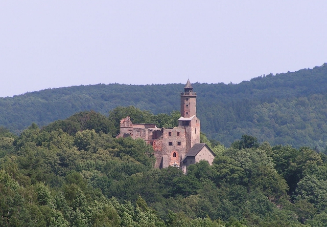 Zamek Grodno w Zagórzu Śląskim. Widok ze wsi Niedźwiedzice. Autor: Wojciech "Spook" Sura.